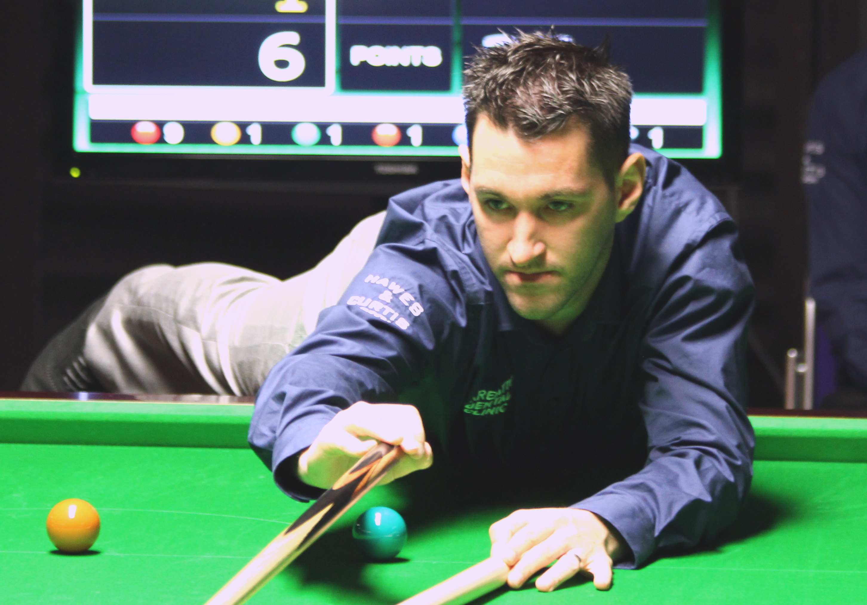 Tom Ford beim Paul Hunter Classic 2015